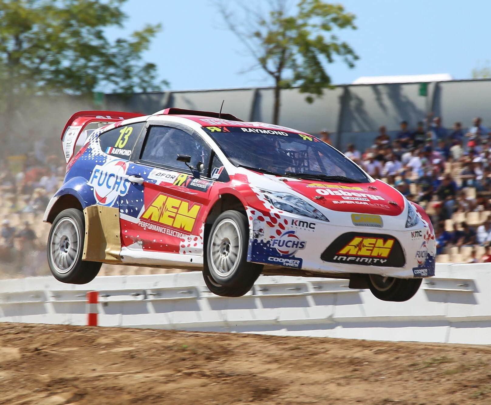 Photographie de Cyril Raymond et sa Ford Fiesta en championnat du monde de rallycross FIA en 2016 (catégorie RX Lites).